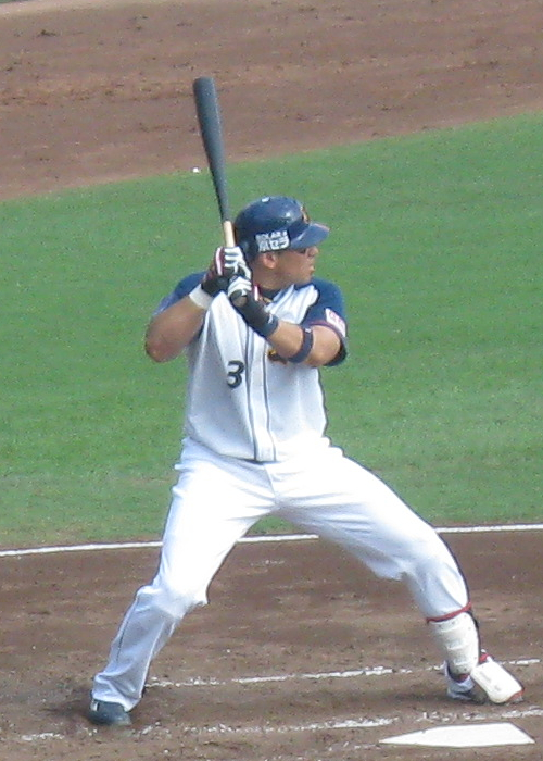 José Fernández